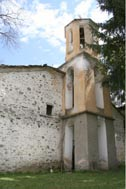 Камбанарията на Доленската църква